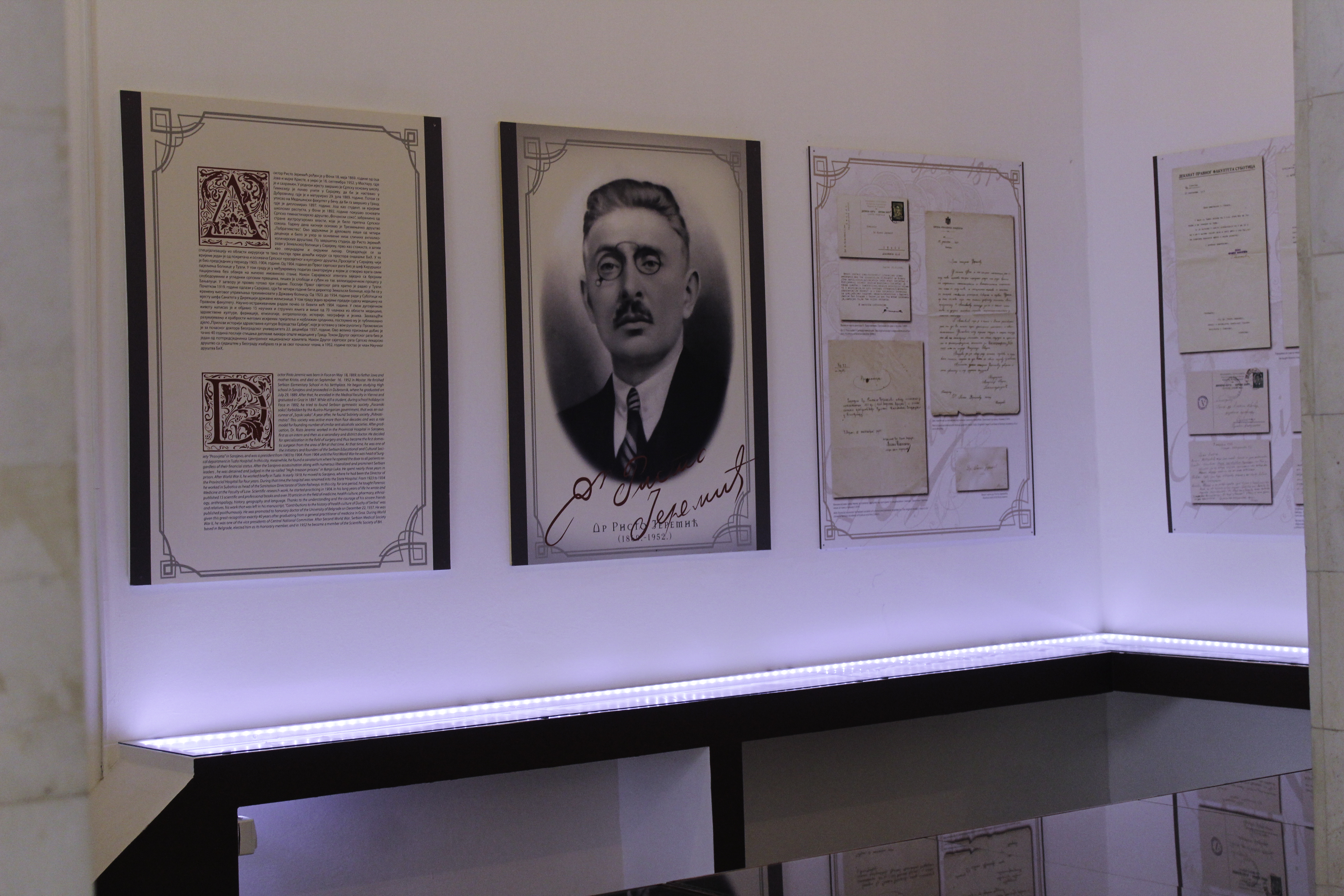 Dio postavke Dr Risto Jeremić - Muzej Stare Hercegovine u Foči.